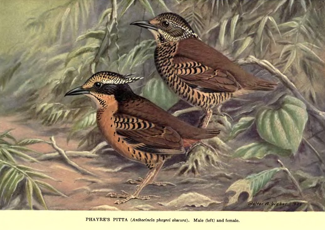 Pitta phayrei